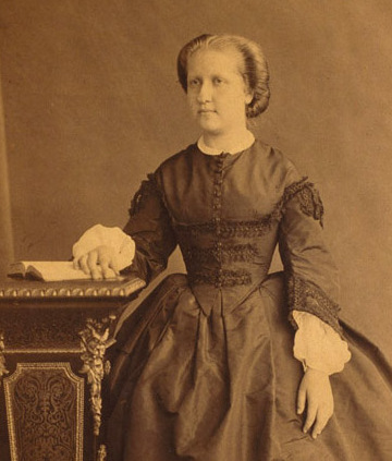 Isabel, Princess Imperial of Brazil.